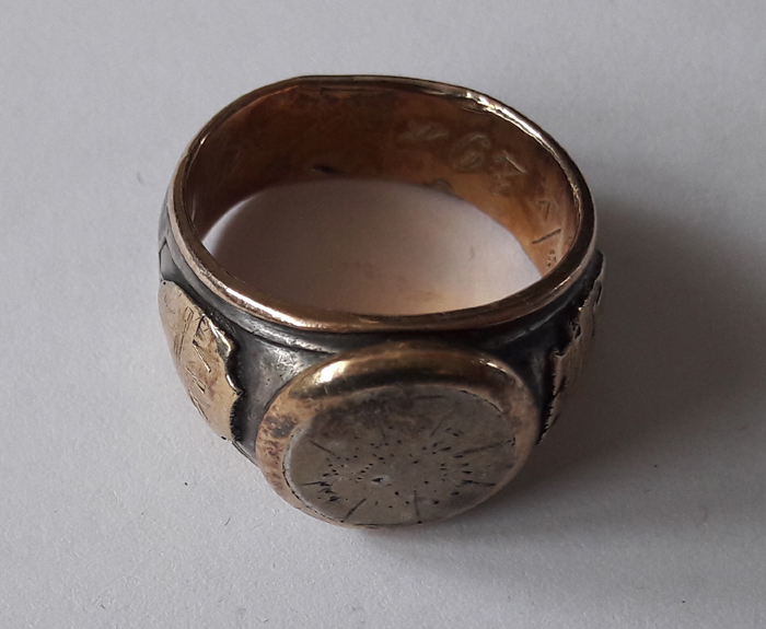 Pierścień 2